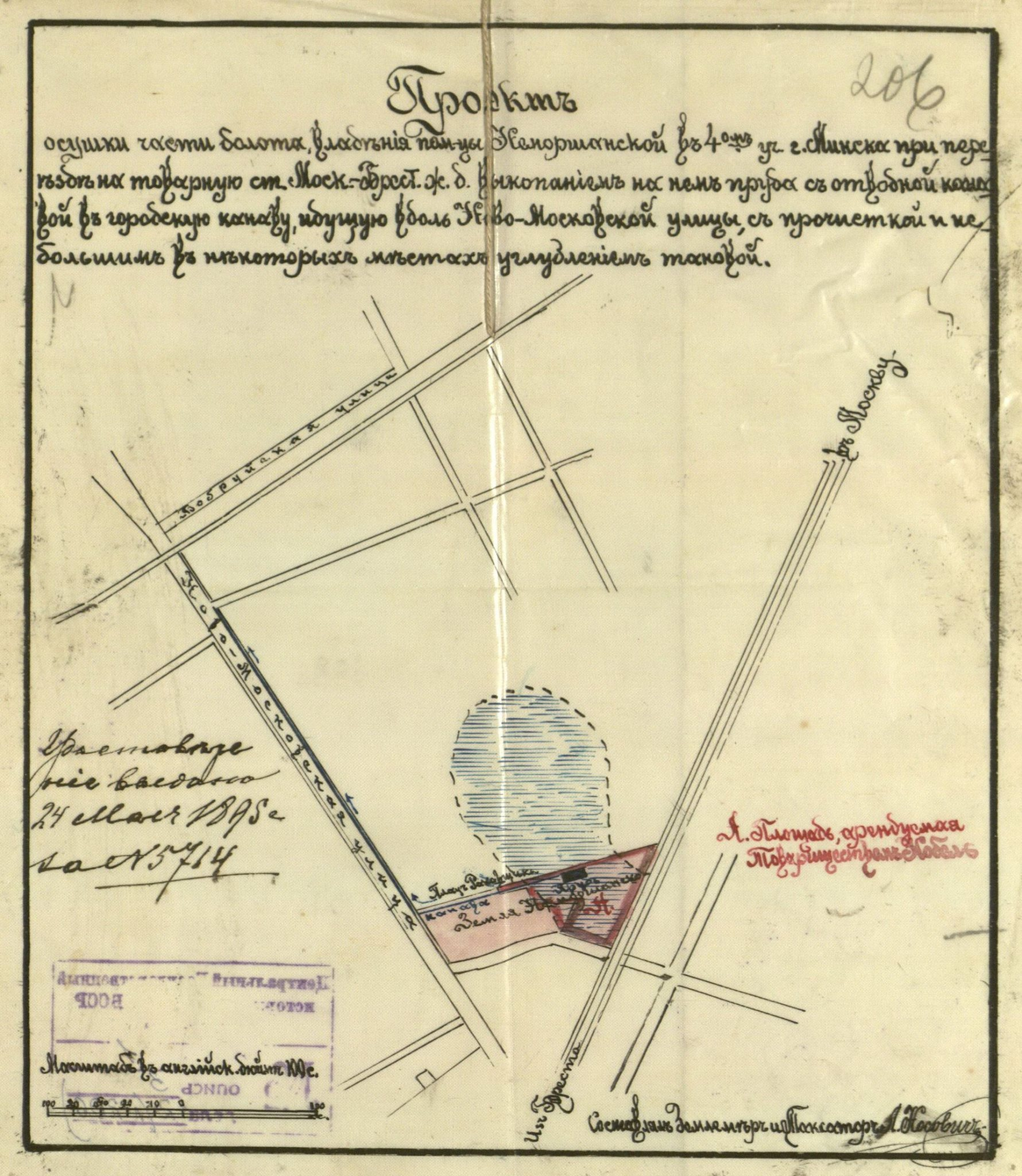 Беларуская (тарашкевіца): Менск (Miensk), Добрыя Мысьлі (Dobryja Myśli). Францішканскае балота (Franciškanskaje bałota)